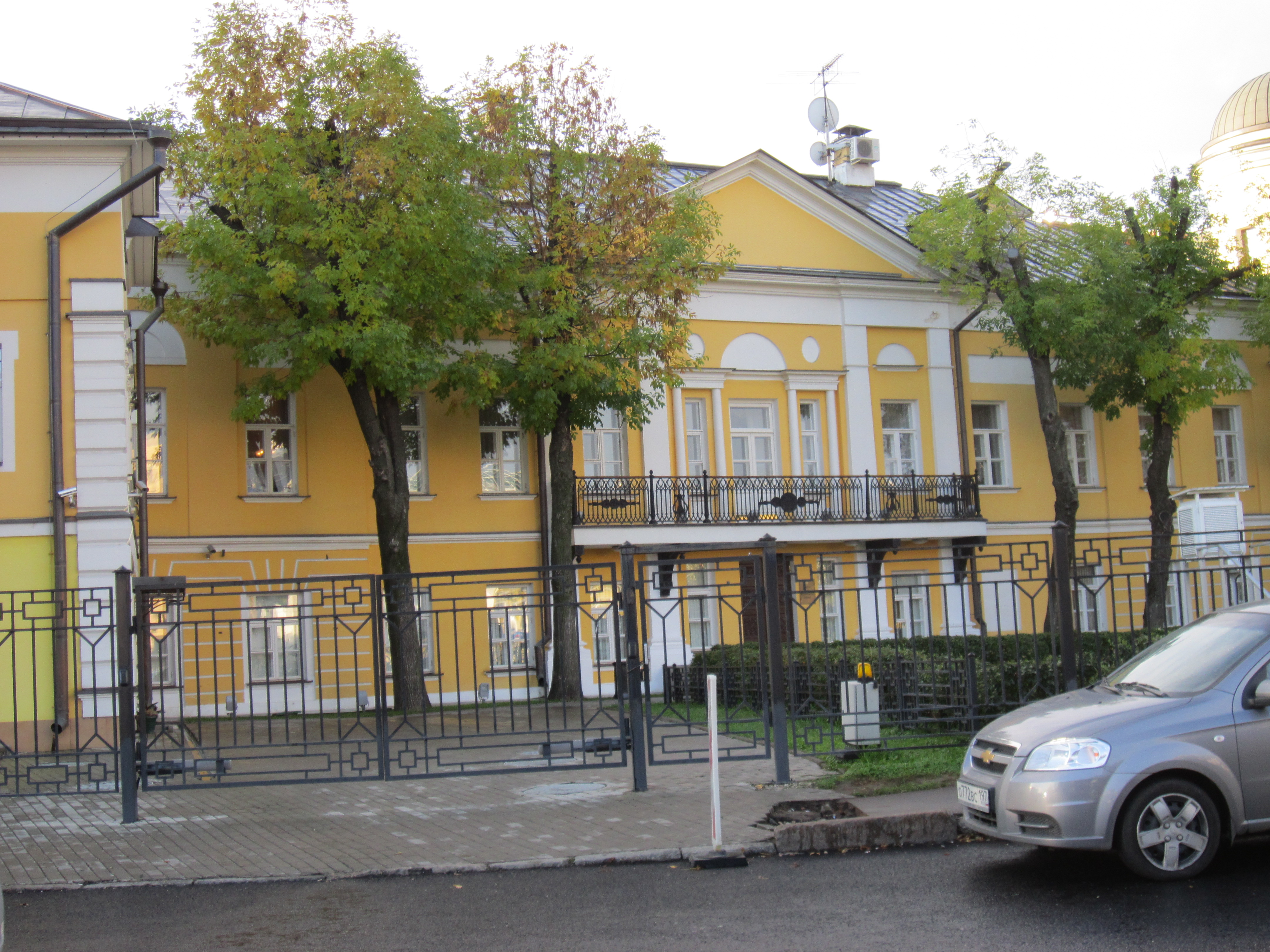 жилой дом купца Ивана Емельянова со стороны Овчинниковской наб.